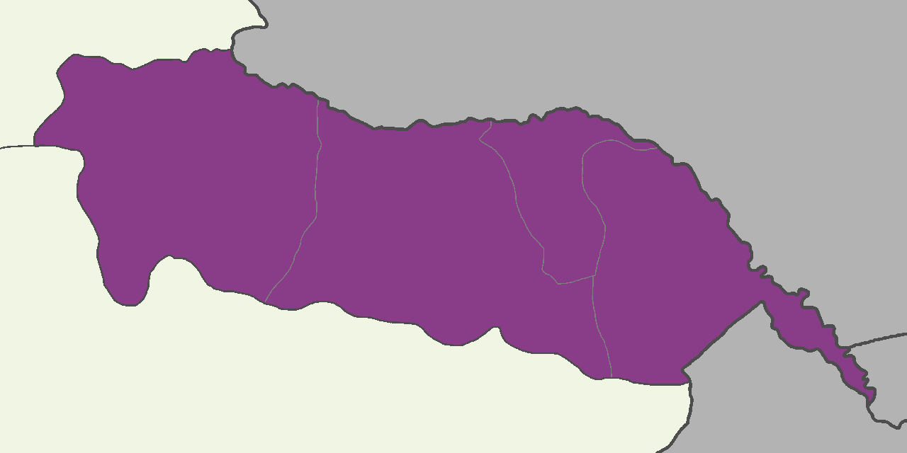 Iğdır'da 2014 Türkiye cumhurbaşkanlığı seçimi sonuçları